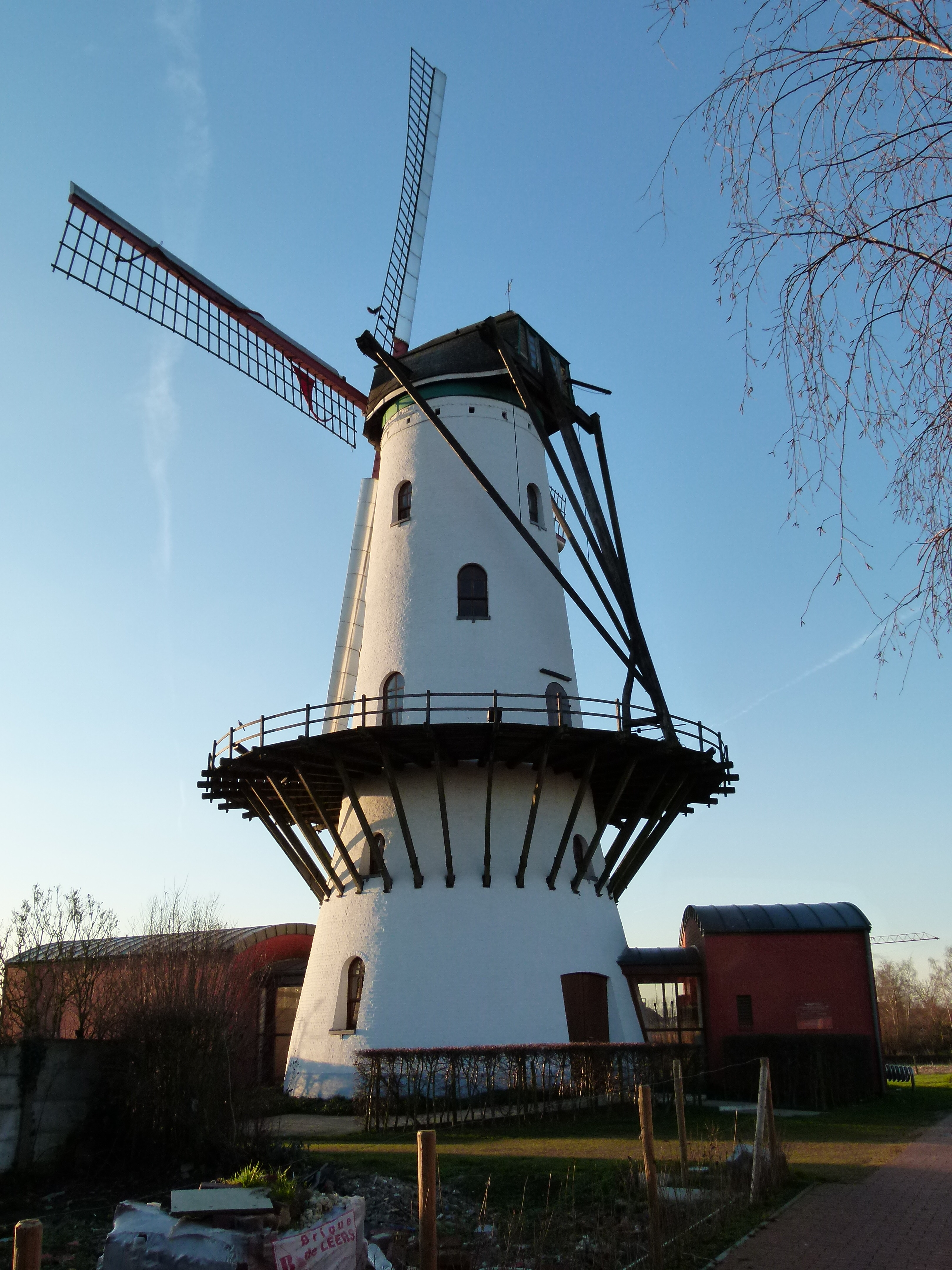 Windmolen Ruiselede